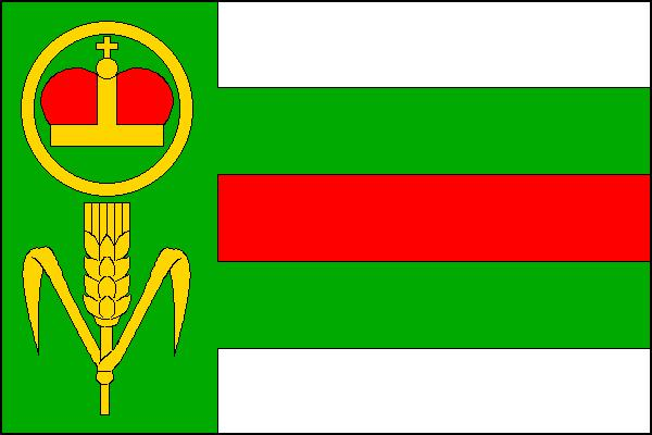 Vlajka obce Třebetice (okres Jindřichův Hradec)